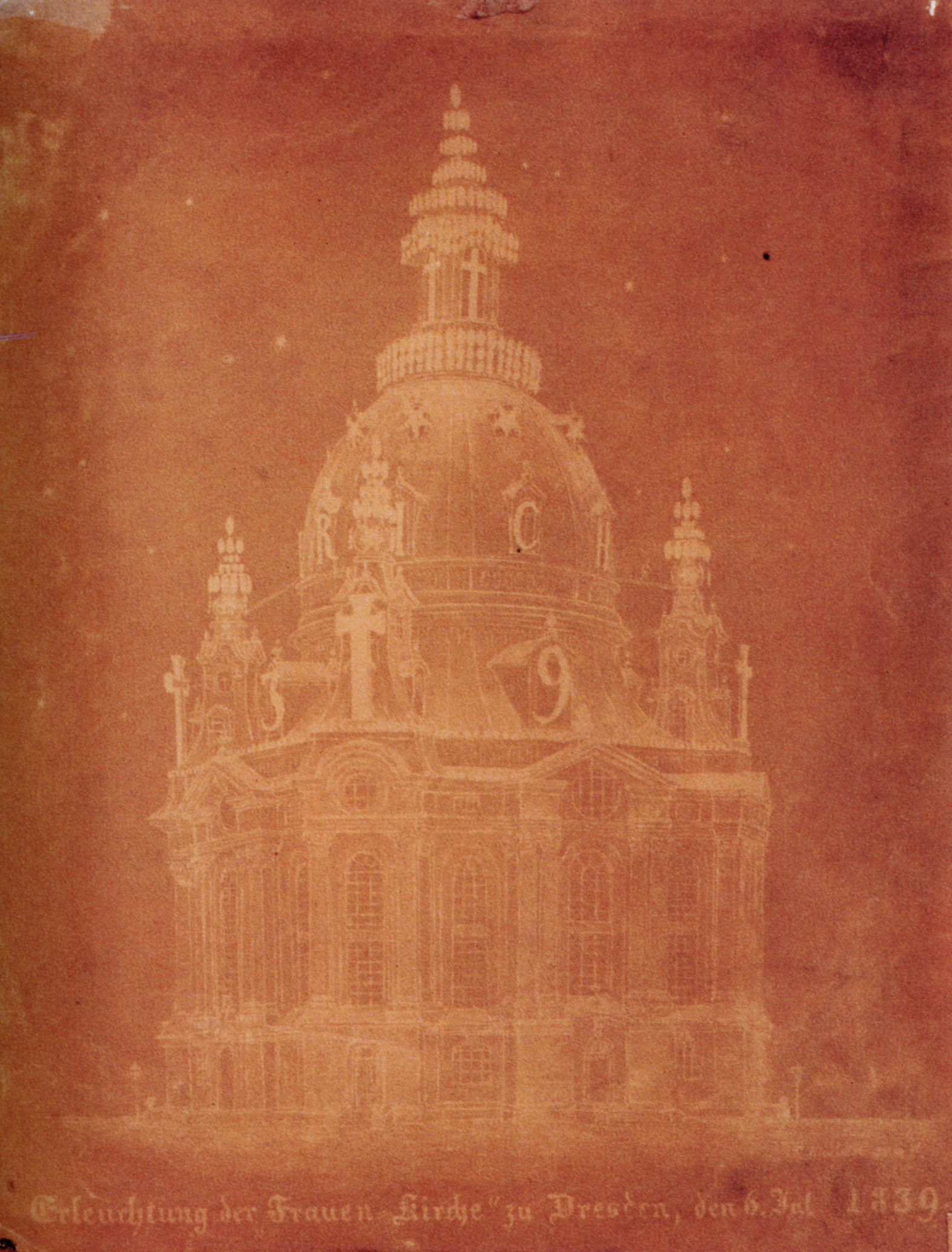 Originale Bildunterschrift: Erleuchtung der Frauen=Kirche zu Dresden, den 6. Jul 1839. Anmerkung commons: Siehe auch Ernst Volkmar Kohlschütter: Predigt am 6. Juli 1839 dem Gedächtnißtage der vor dreihundert Jahren in Dresden eingeführten Reformation in der evangelisch-reformirten Kirche daselbst gehalten, Dresden 1839. (Digitalisat)